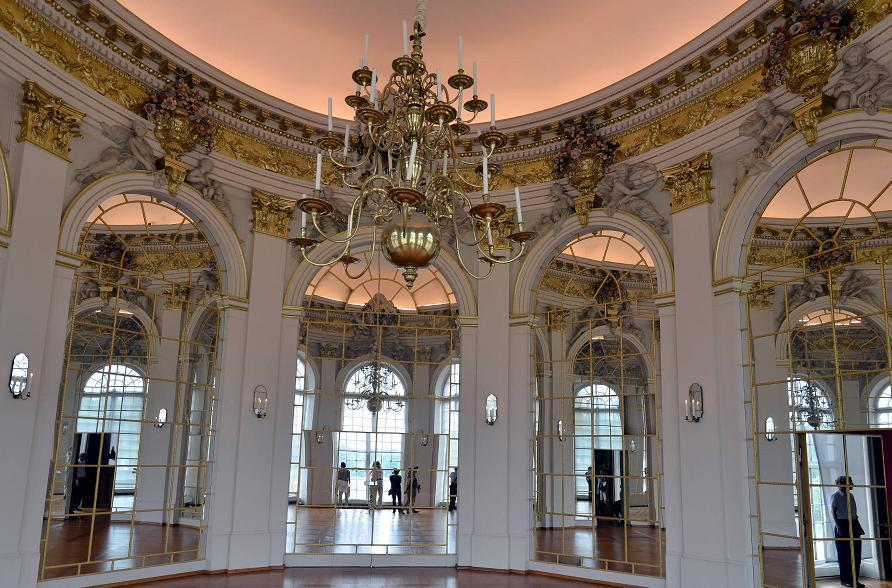 Salon des miroirs du château de Charlottenburg, Allemagne. Cette pièce est contemporaine du Grand Cabinet Ovale, et similaire dans son plan ovale, son volume, ainsi que dans l'emploi systématique des miroirs.